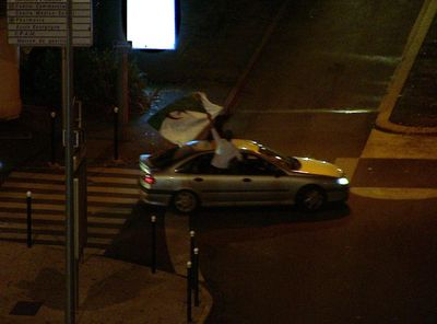 Voiture avec un drapeau algérien à Planoise.